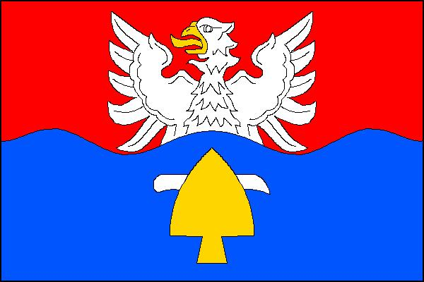 Vlajka obce Cep (okres Jindřichův Hradec)